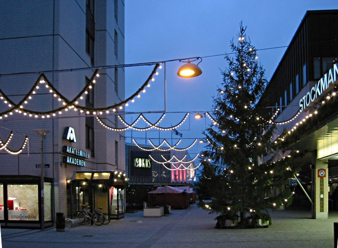 Tapiolan liikekeskustaa illalla joulukuussa 2004.